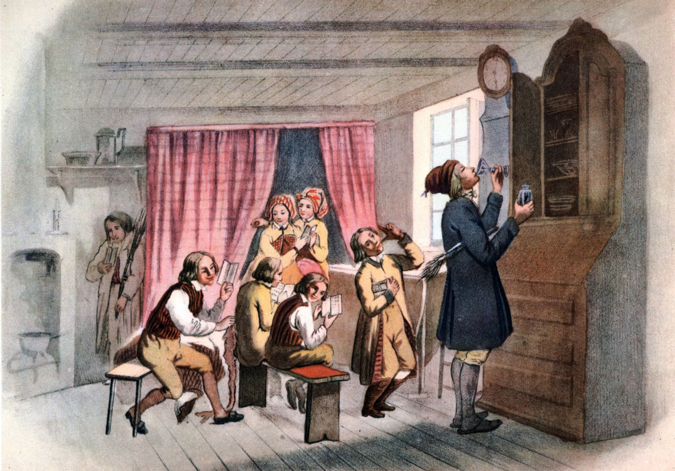 Skola i Vingåker. Kolorerad litografi